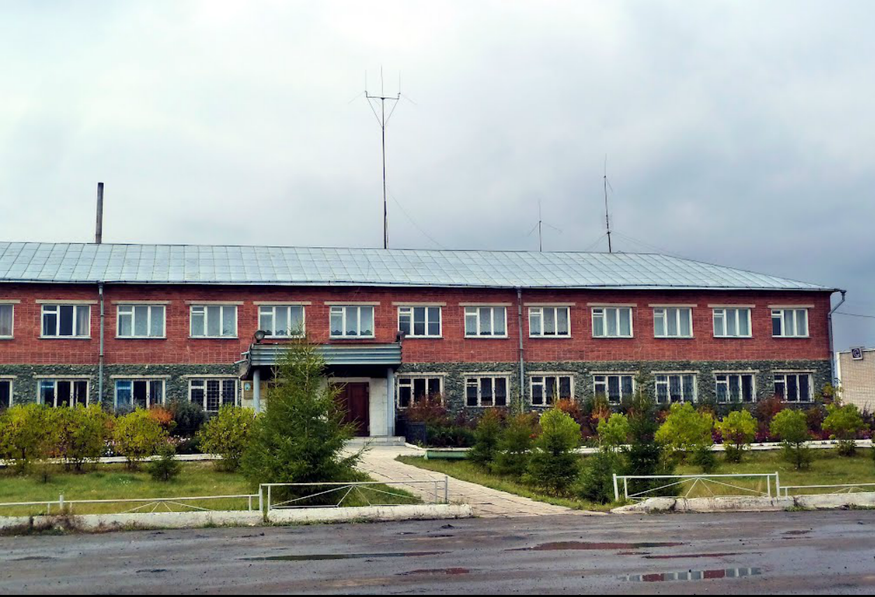 ратуша